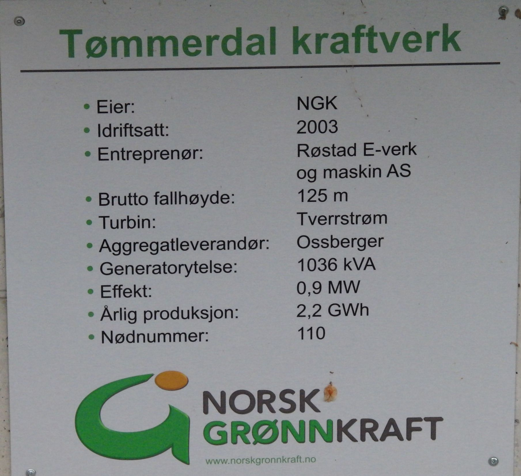 Tømmerdal kraftverk informasjonsplakat